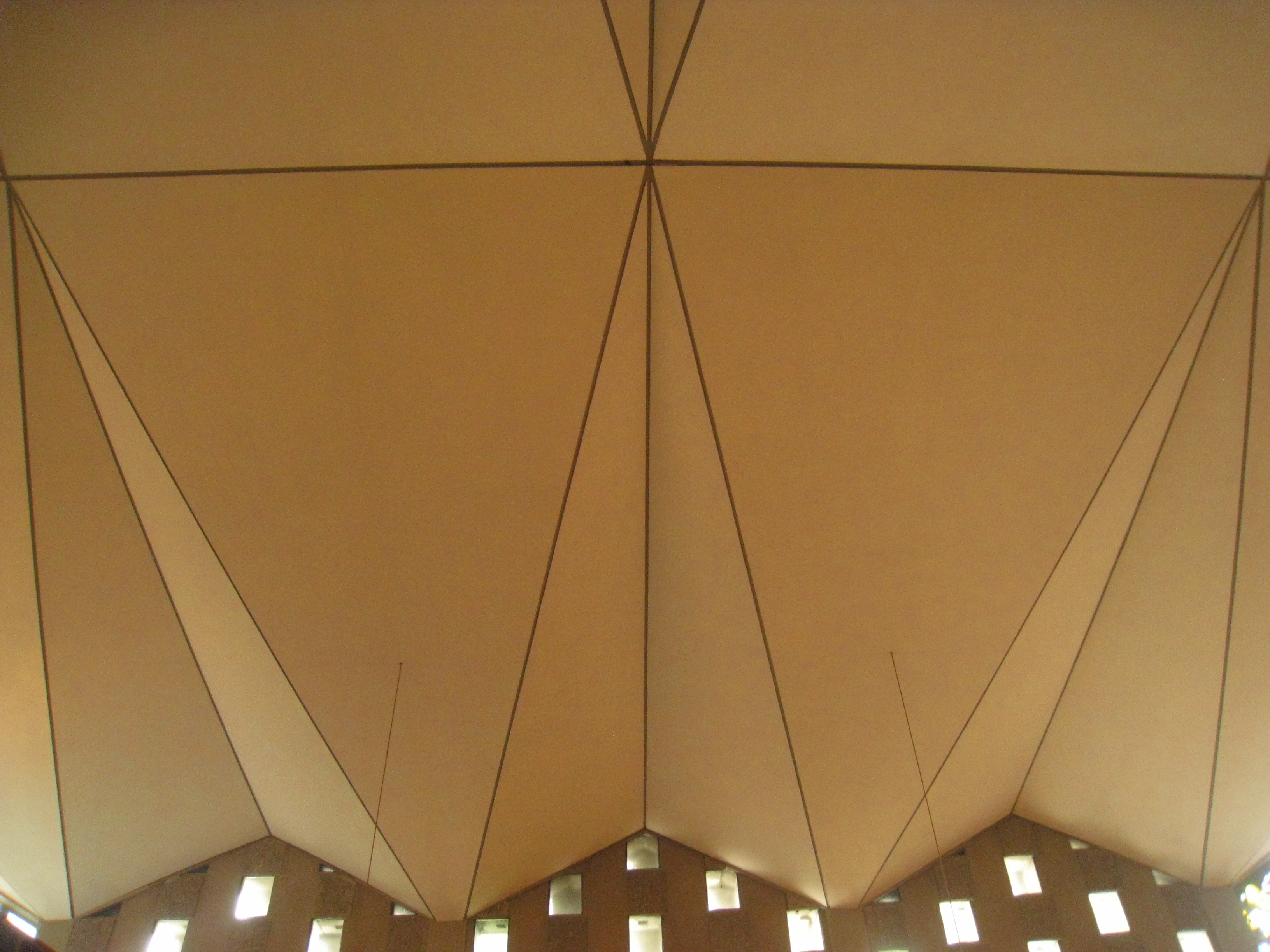 Blick Richtung Süden